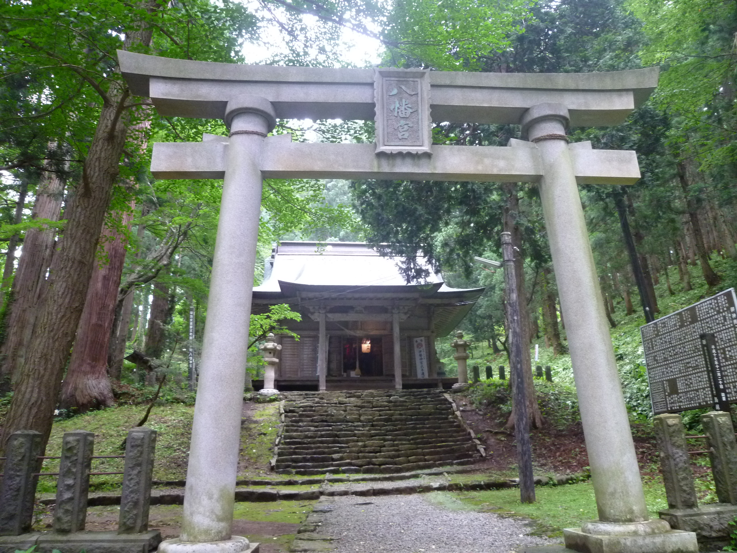 鳥越八幡神社。 山形県新庄市鳥越に所在。 国指定重要文化財。